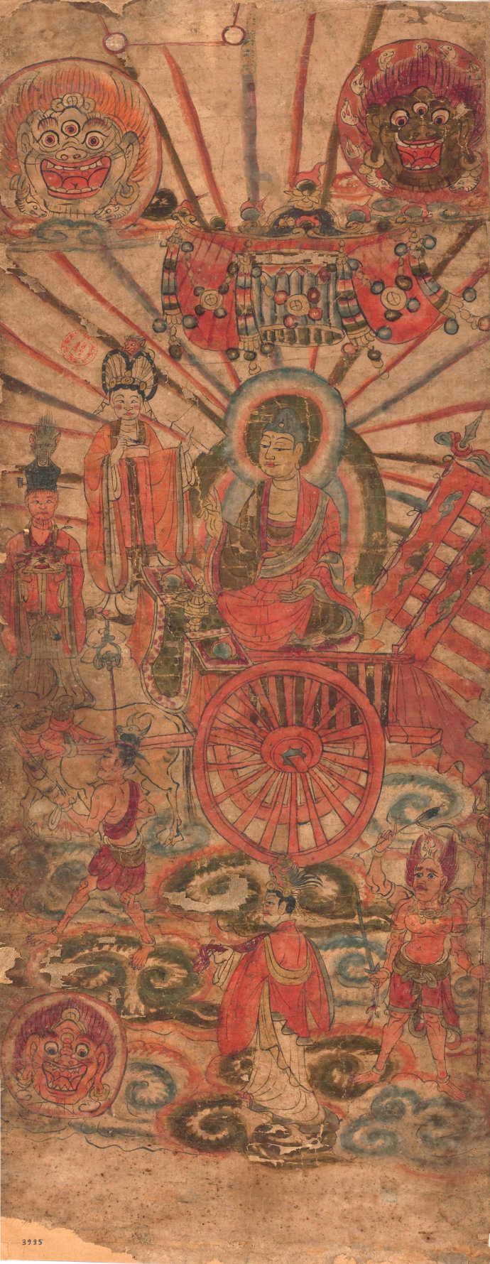 Pintura polícroma budista china que representa a Buda Tejaprabhā (Buda de las luces encendidas/resplandecientes) sentado en un carro tirado por un buey y rodeado por los cinco planetas: Mercurio, Venus, Marte, Júpiter y Saturno.